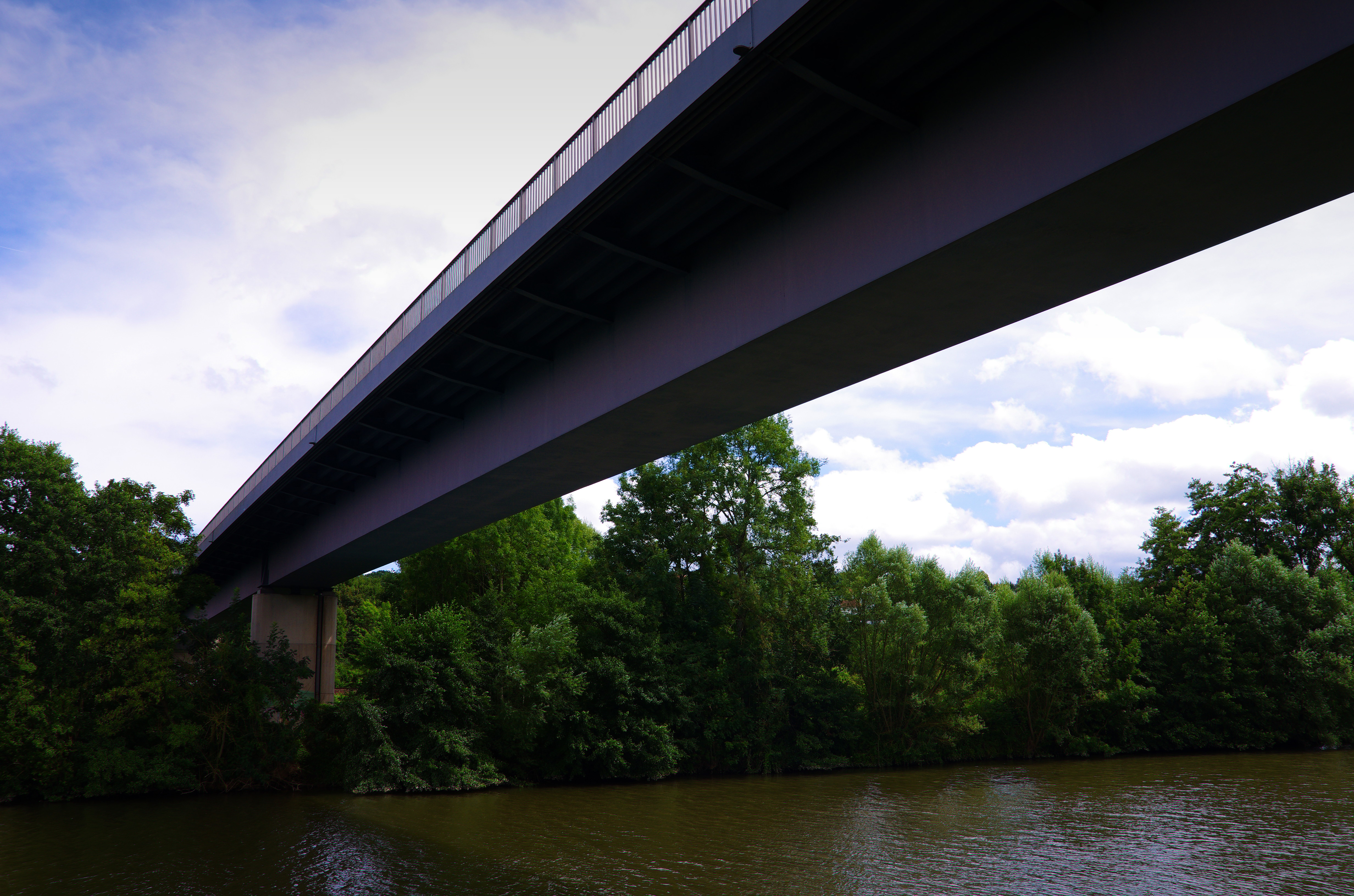 Die Abt-Fulrad-Brücke bei Auersmacher ist eine 1983 erbaute, grenzüberschreitende Straßenbrücke mit zwei Fahrstreifen für den Fahrzeugverkehr, sowie beidseitigen Fußwegen zwischen den EU-Mitgliedsstaaten Deutschland und Frankreich